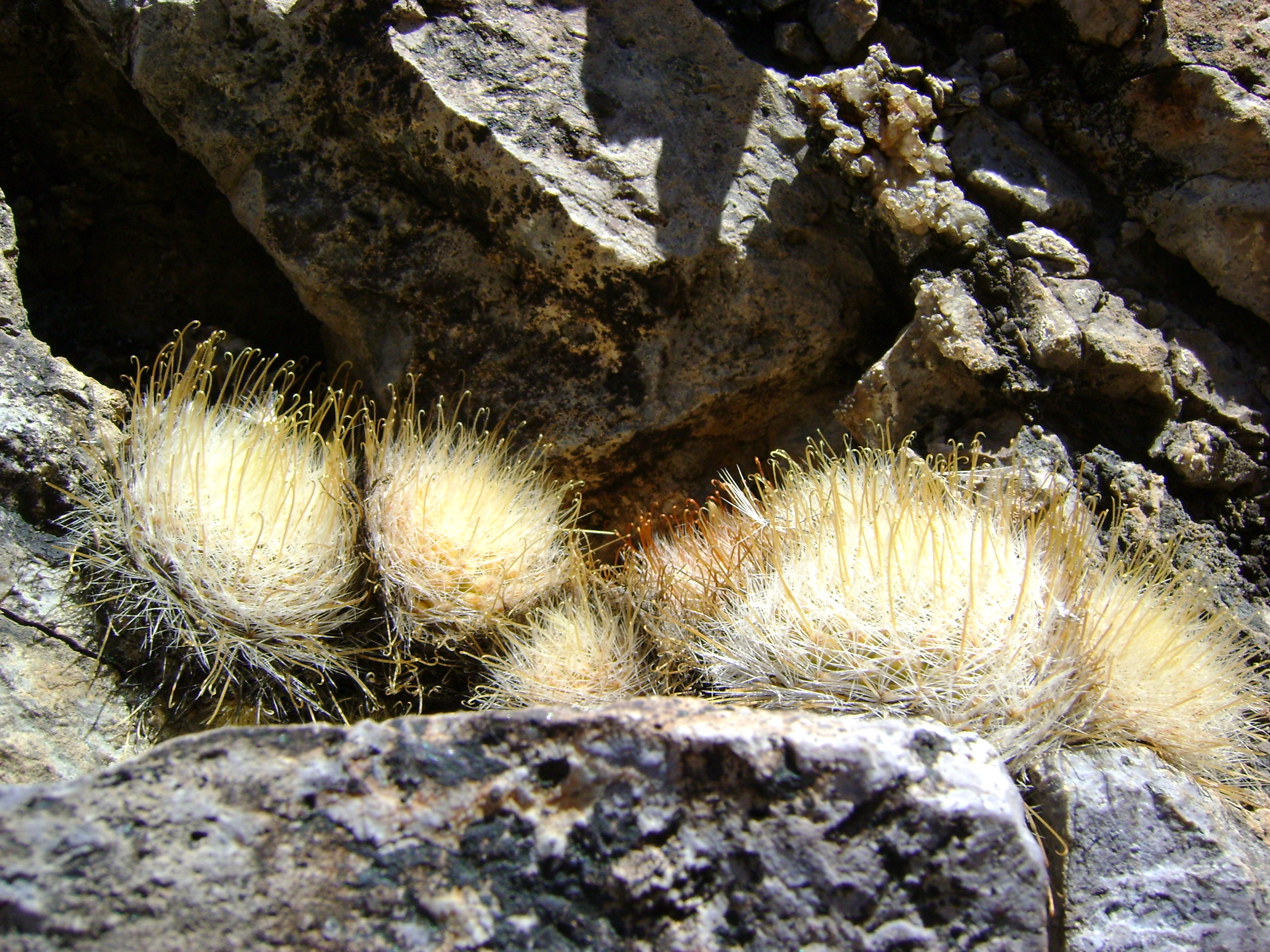 Opposite Linares Del Rio Nazas